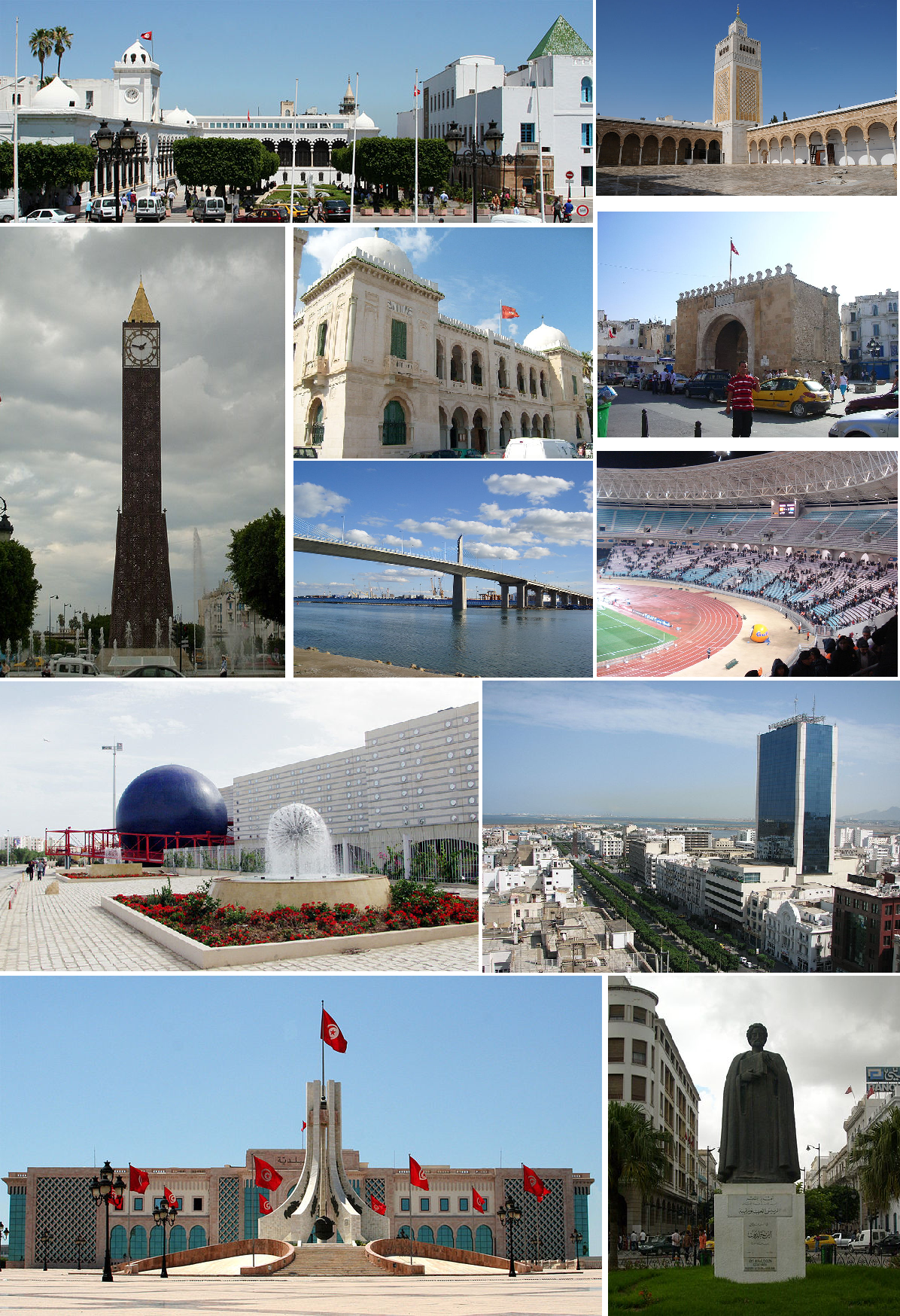 Montage de photos de la ville de Tunis